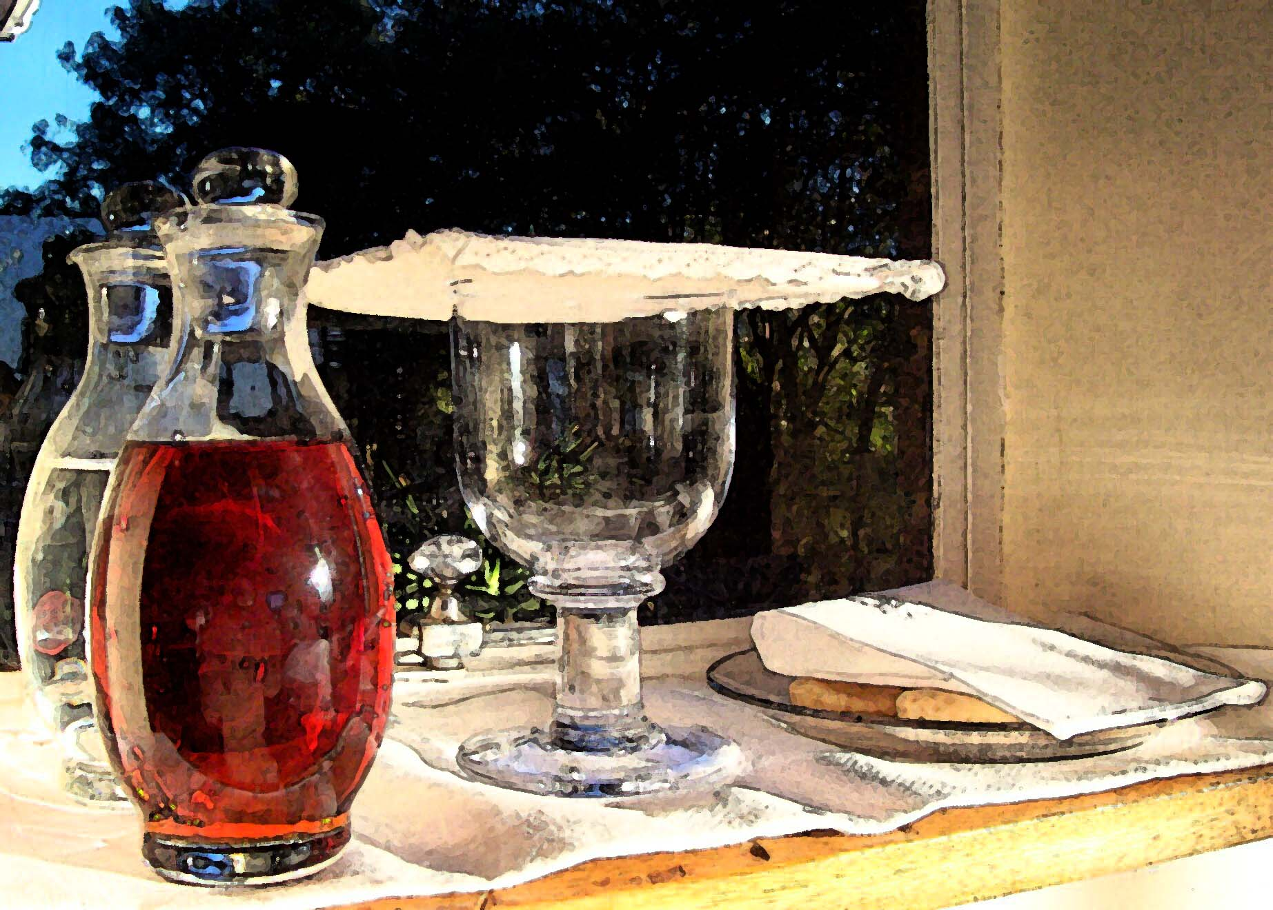 Vin de messe